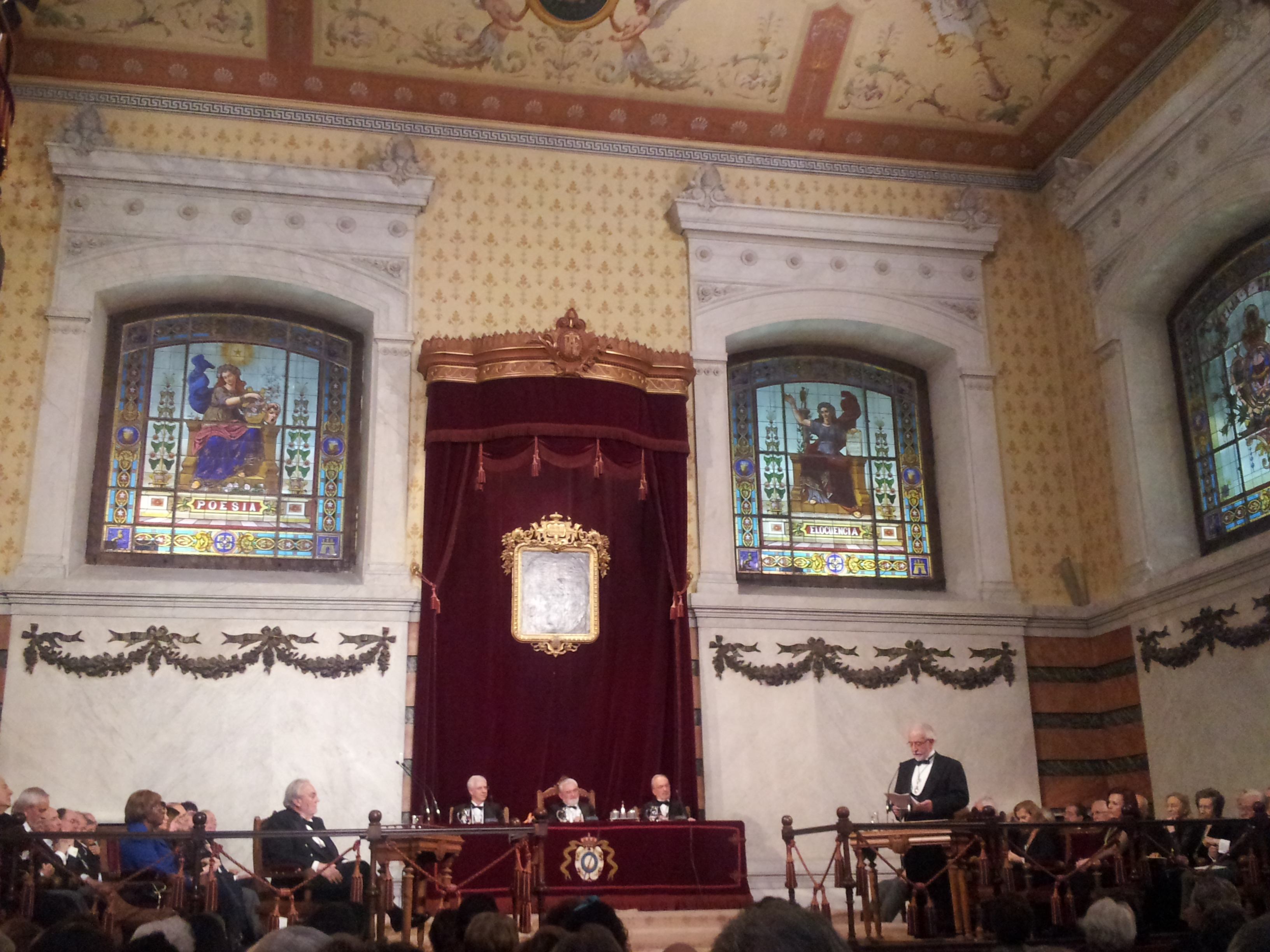 Recepción pública a Manuel Gutiérrez Aragón el 24 de enero de 2016 en la Real Academia Española